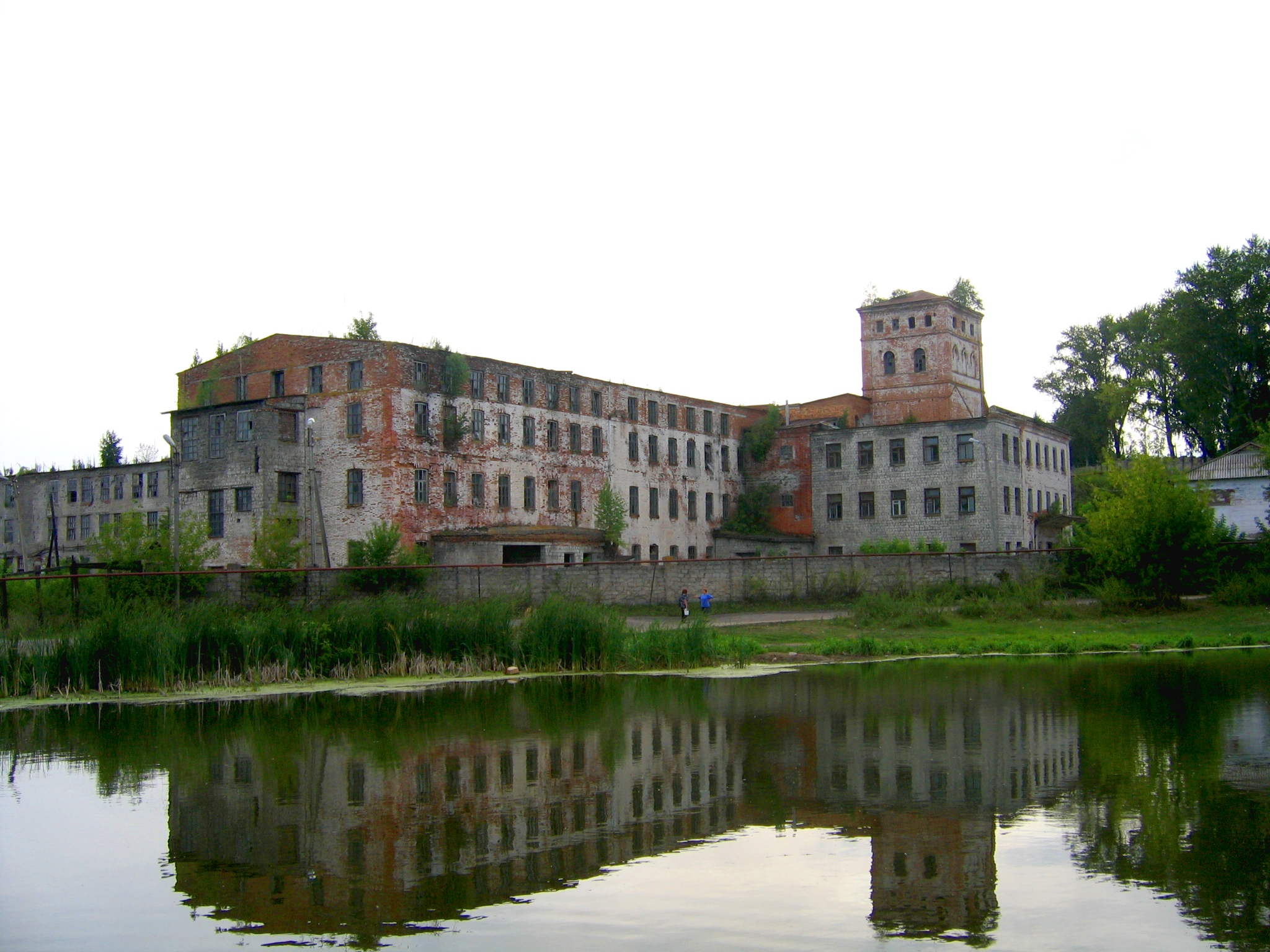 Старое здание Мулловской суконной фабрики